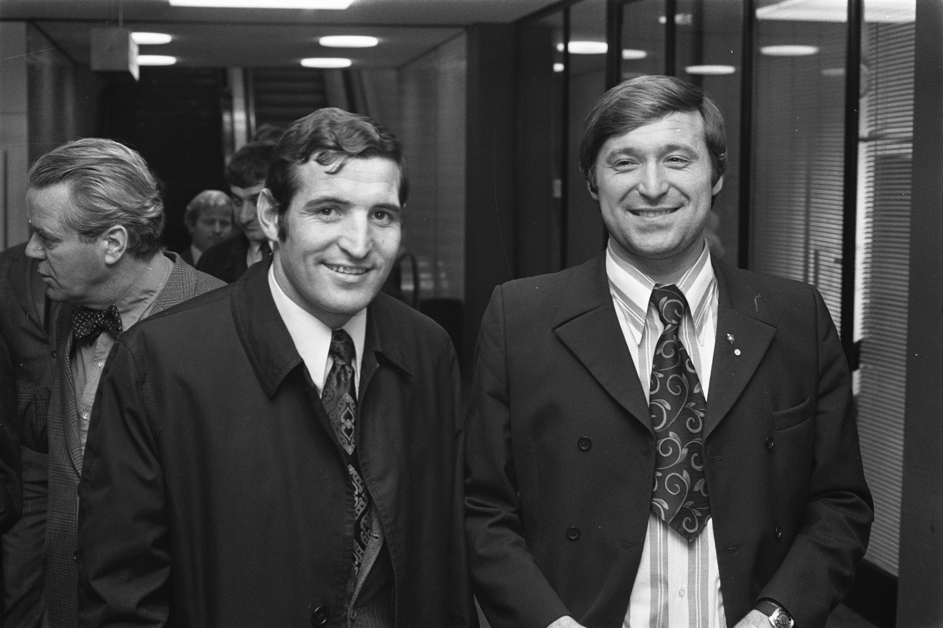 Collectie / Archief : Fotocollectie Anefo Reportage / Serie : [ onbekend ] Beschrijving : Elftal CSKA-Sofia op Schiphol, Penev (links) en Zhekov Datum : 22 oktober 1973 Locatie : Noord-Holland, Schiphol Trefwoorden : elftallen Persoonsnaam : CSKA-sofia Fotograaf : Verhoeff, Bert / Anefo Auteursrechthebbende : Nationaal Archief Materiaalsoort : Negatief (zwart/wit) Nummer archiefinventaris : bekijk toegang 2.24.01.05 Bestanddeelnummer : 926-7631